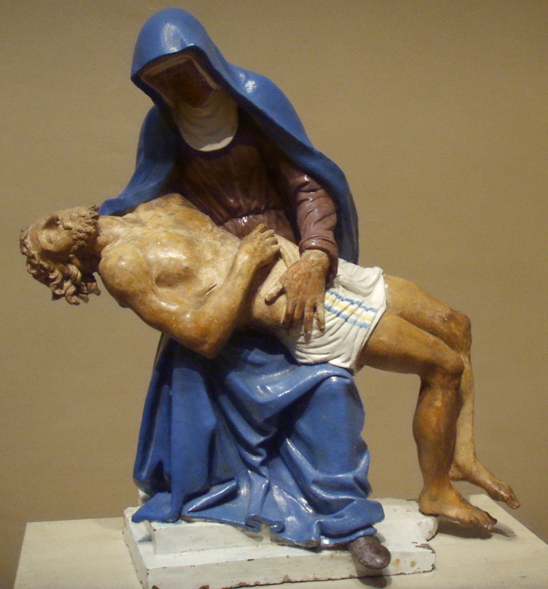 National gallery in washington d.c., giovanni della robbia, pietà, 1510-1520